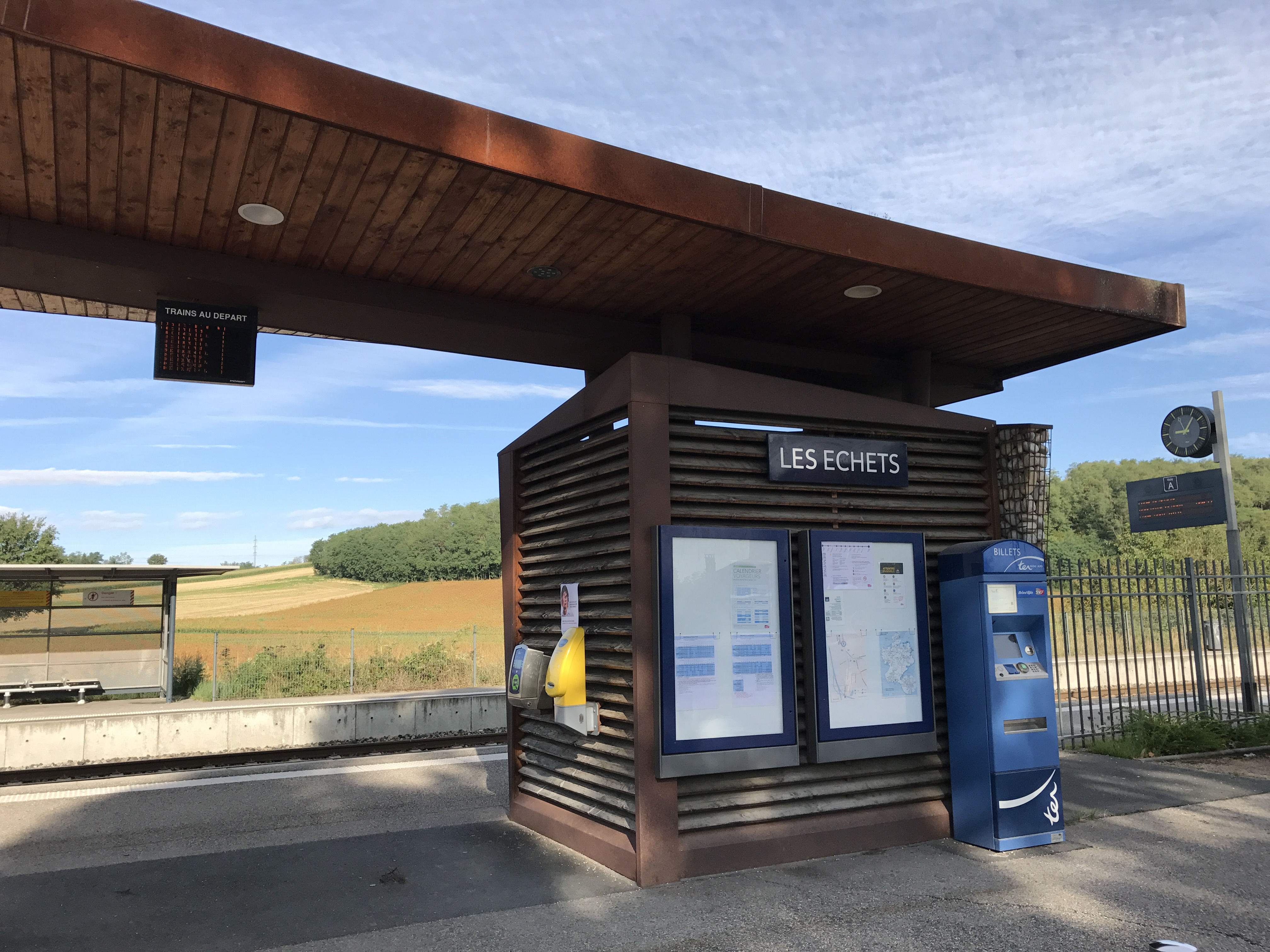 Gare des Échets en août 2017.